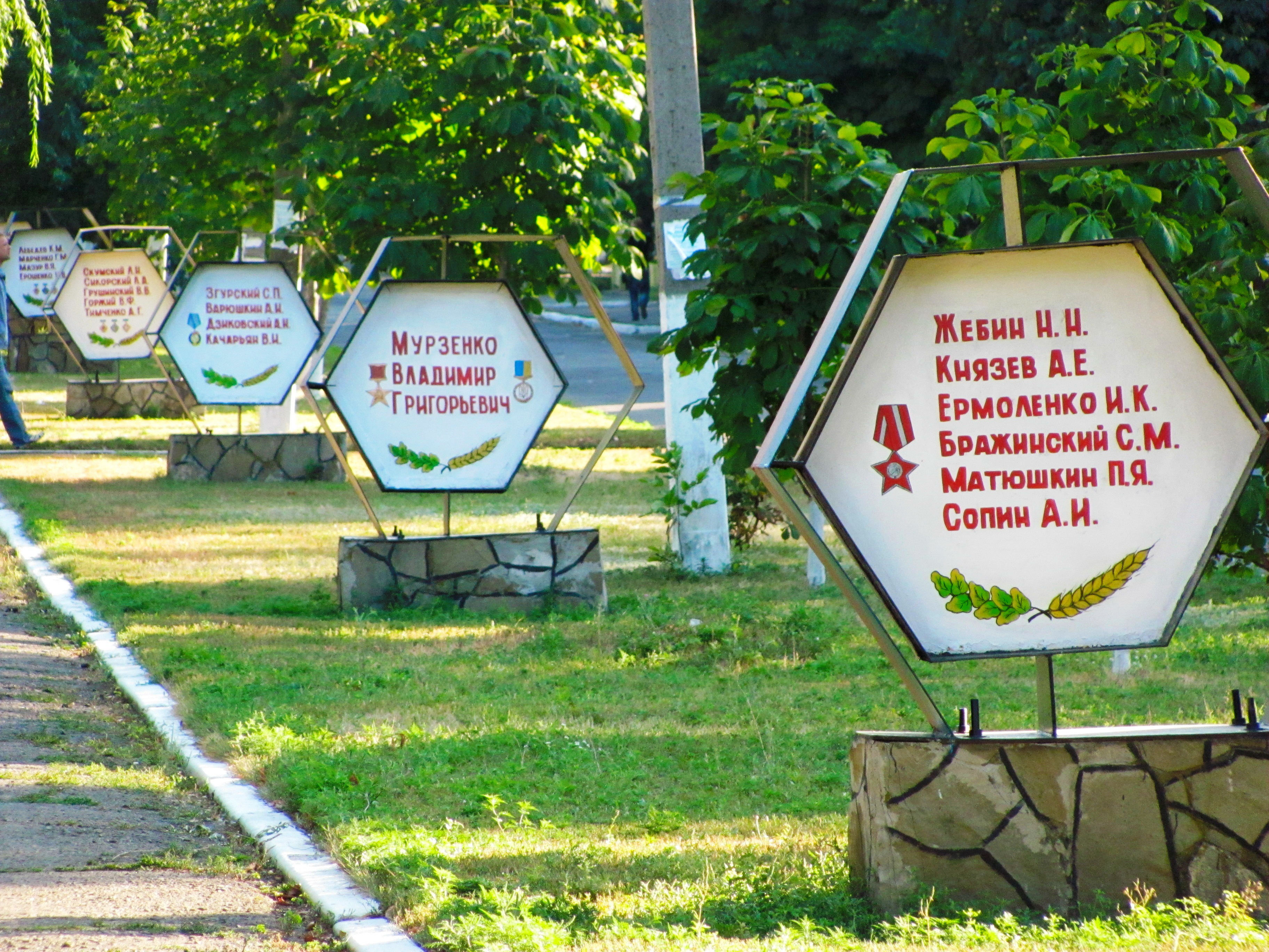 Червонопартизанск